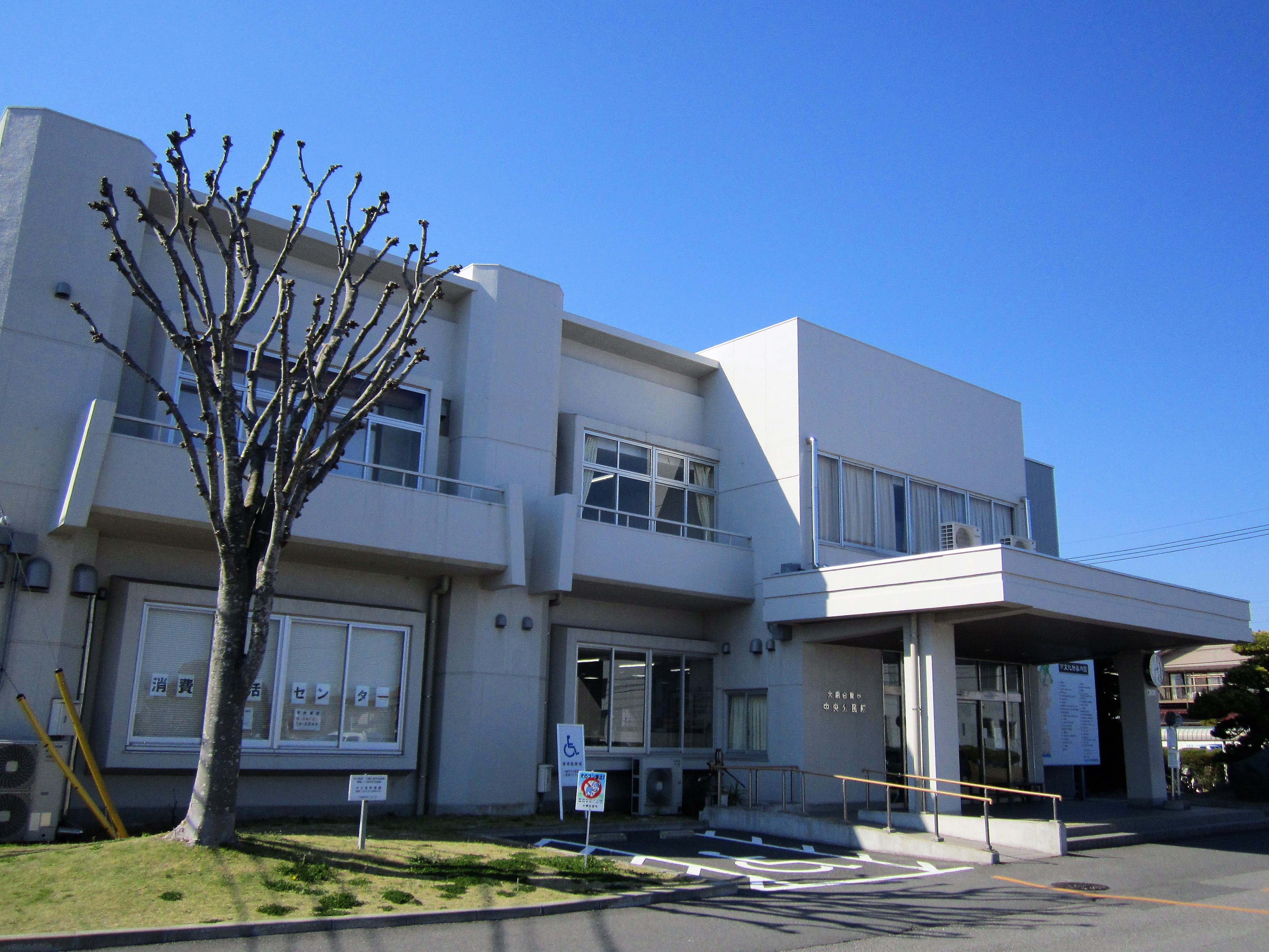 大網白里市中央公民館（大網白里市大網） Canon PowerShot A2200